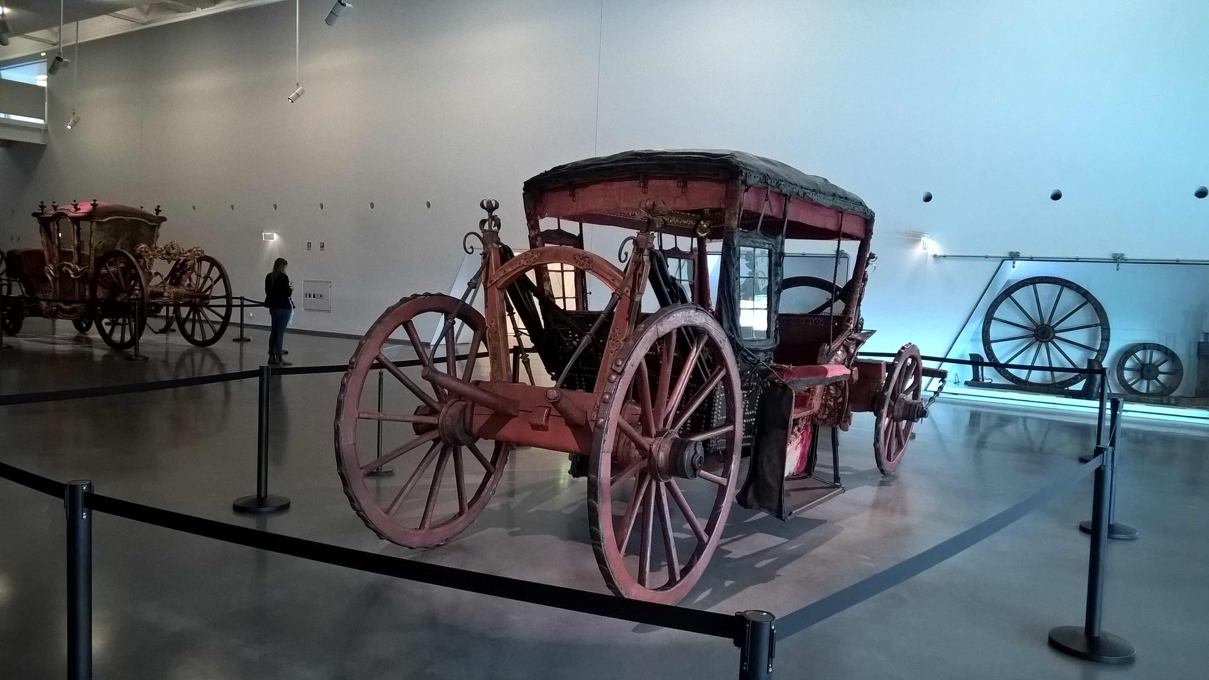 Coches no Museu Nacional dos Coches (Lisboa)